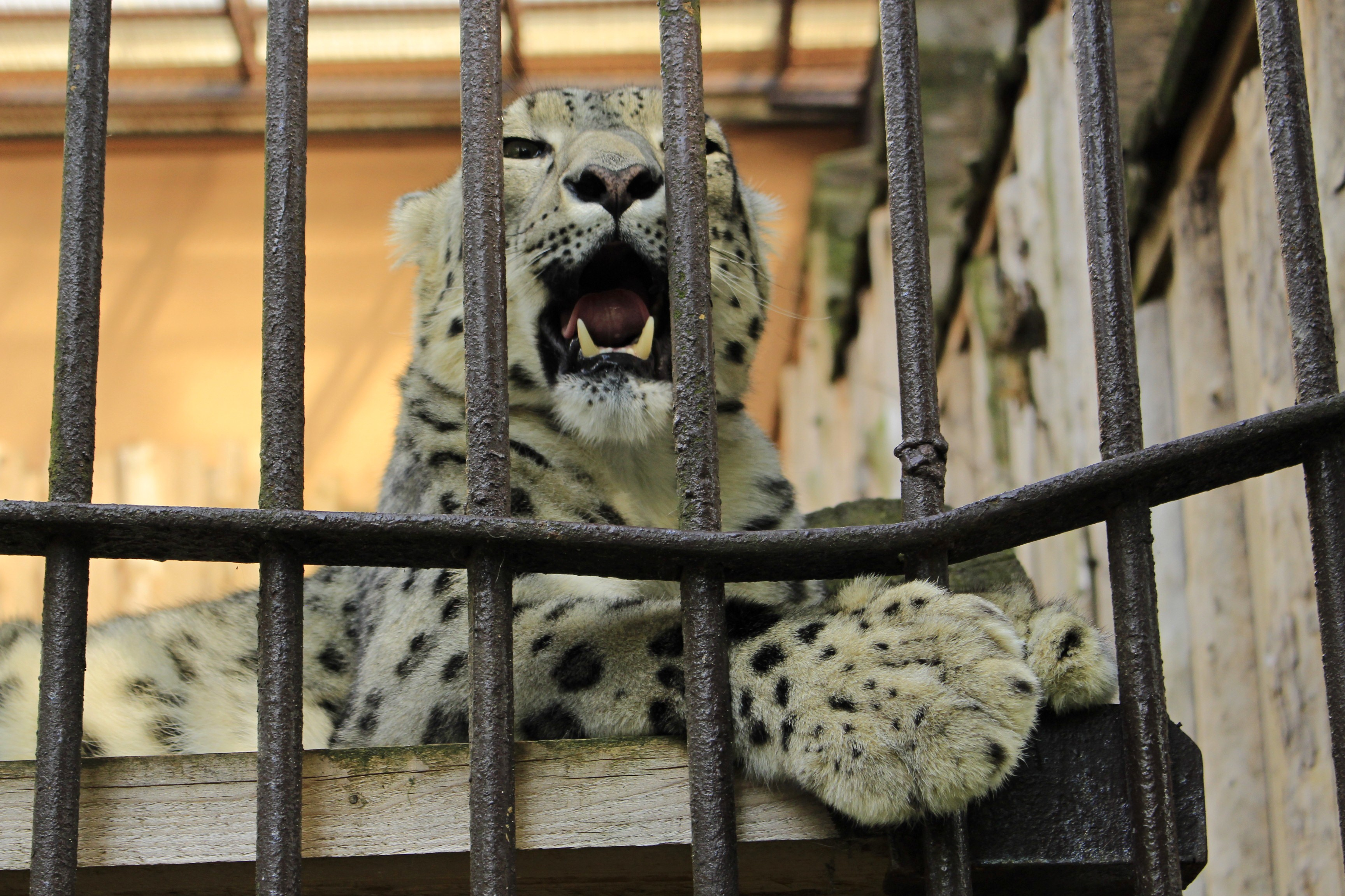 Snieginis leopardas Lietuvos zoologijos sode